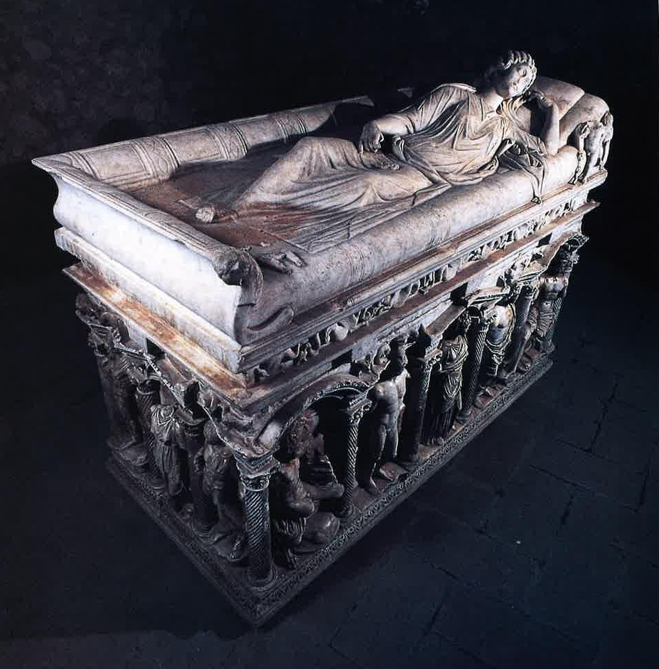 Sarcofago